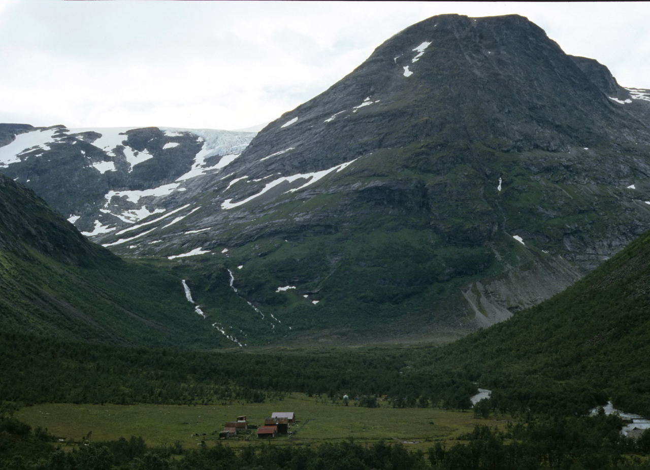 Bødalsseter, Loen, Stryn kommune